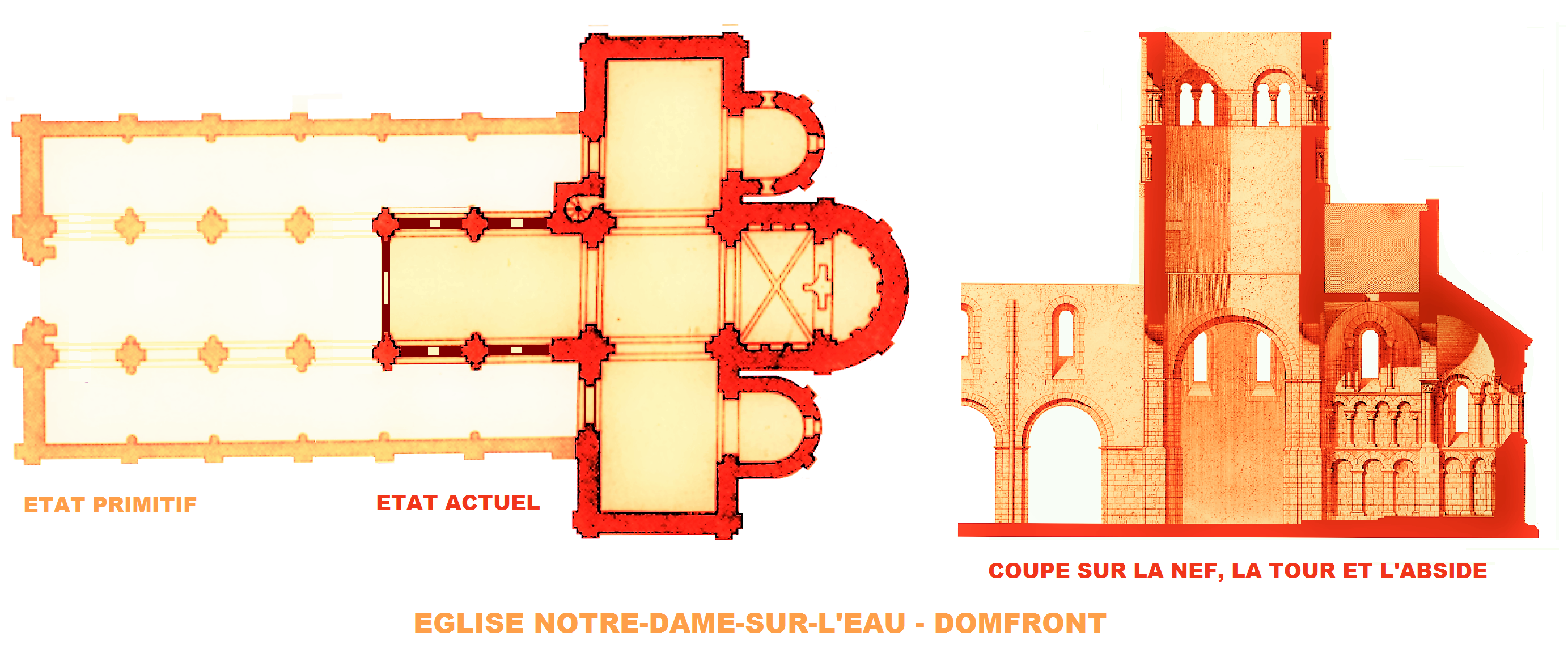 Domfront, Orne, Eglise Notre-Dame-sur-l'eau, Plan et coupe (Image du domaine public modifiée)